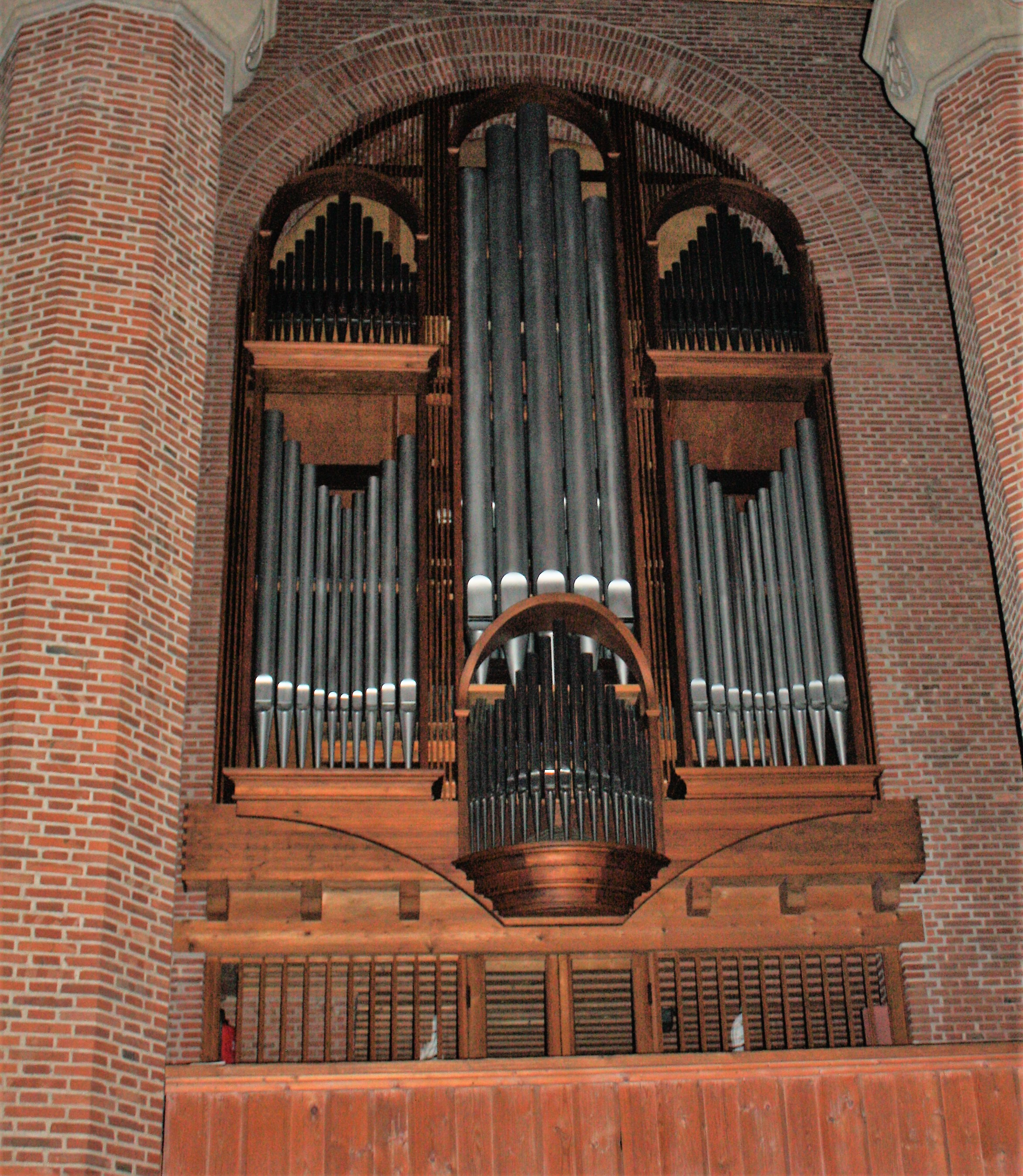 Reformations-Gedächtnis-Kirche (Nürnberg), linker Teil der Orgel